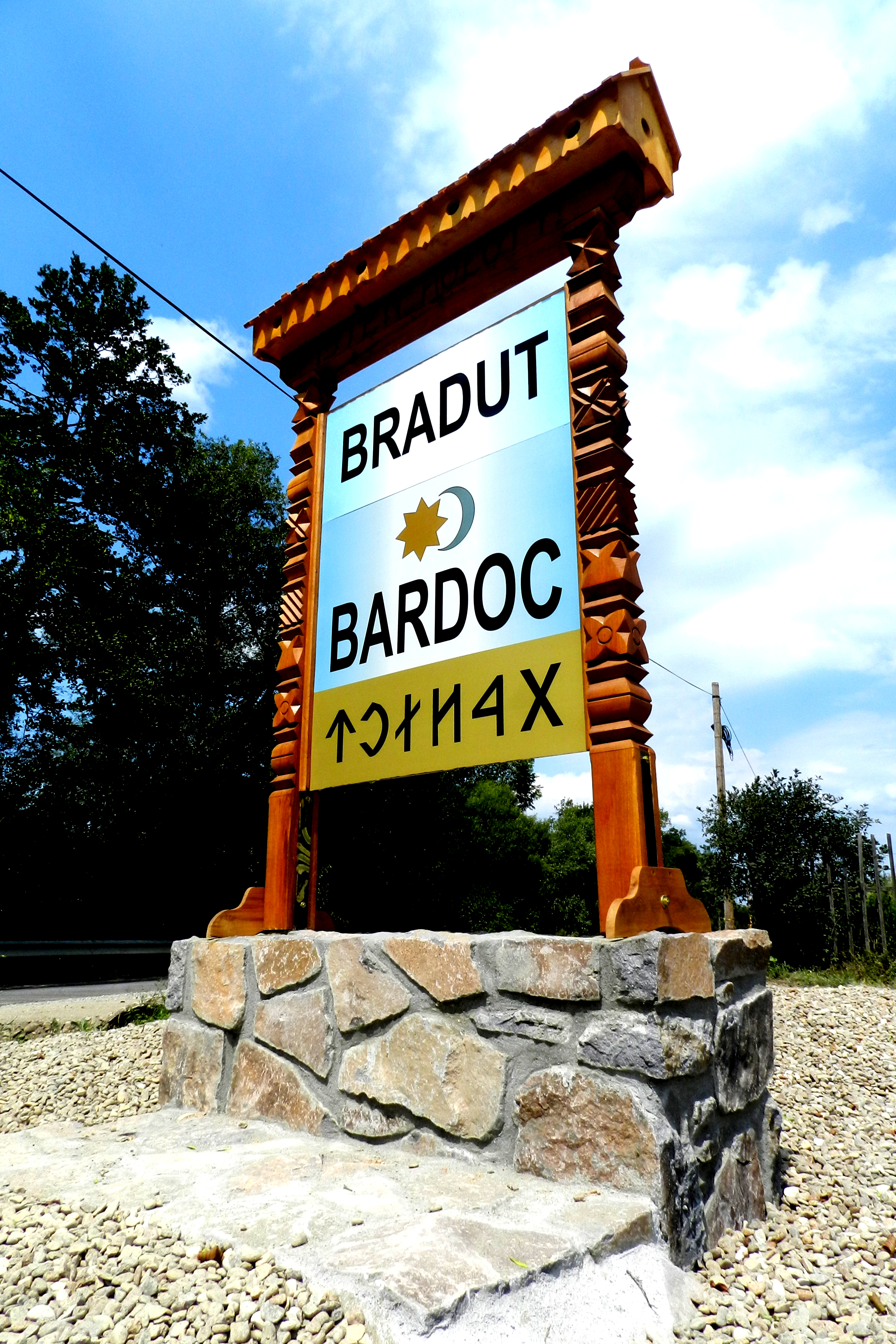 A bardoci helynévtábla